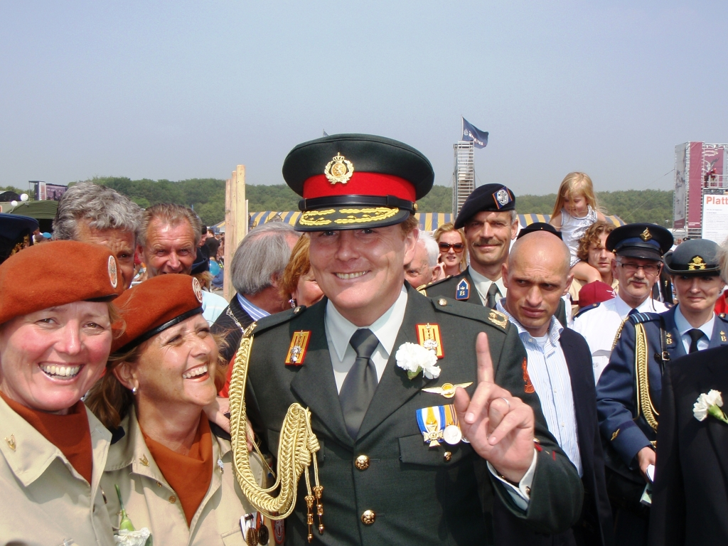 Prins Willem-Alexander op de foto met 2 veteranen met steenrode baretten, van de Multinational Force and Observers.